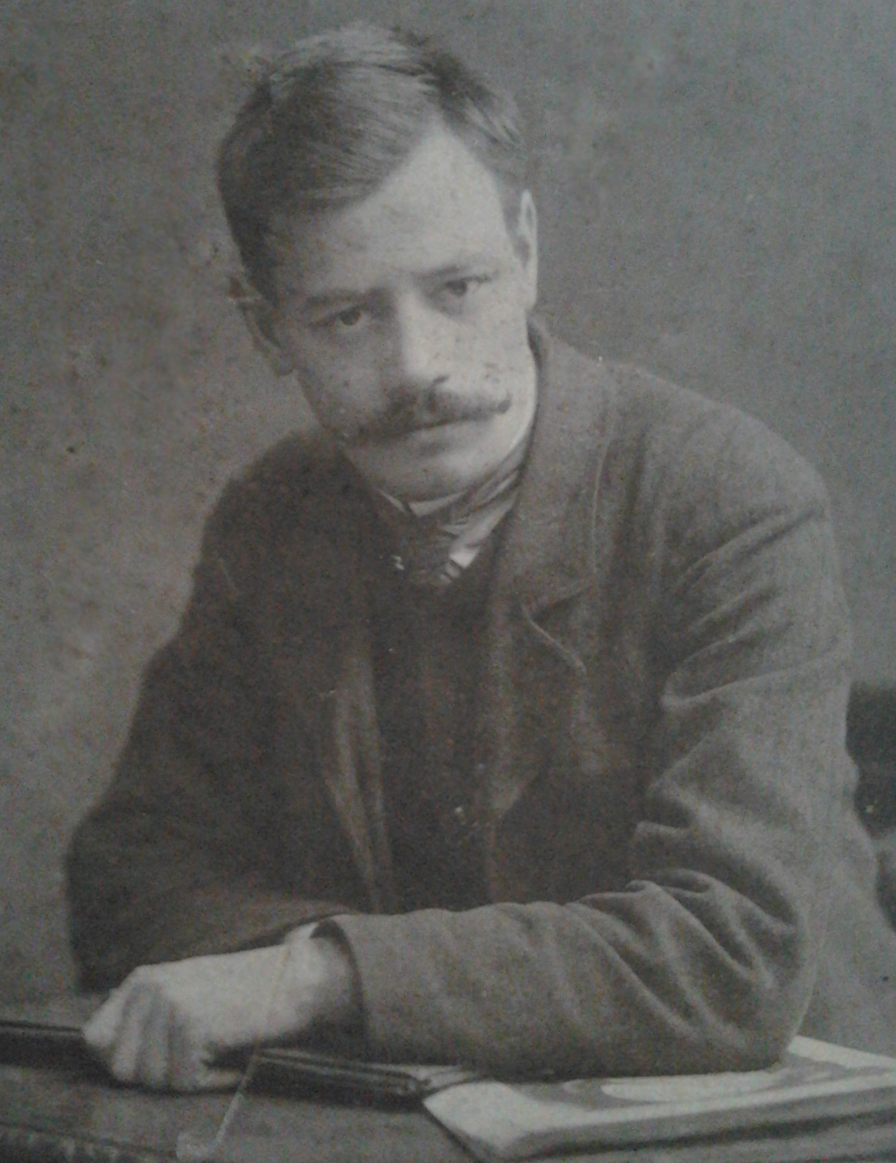 Кузнецов Владимир Александрович. 1909